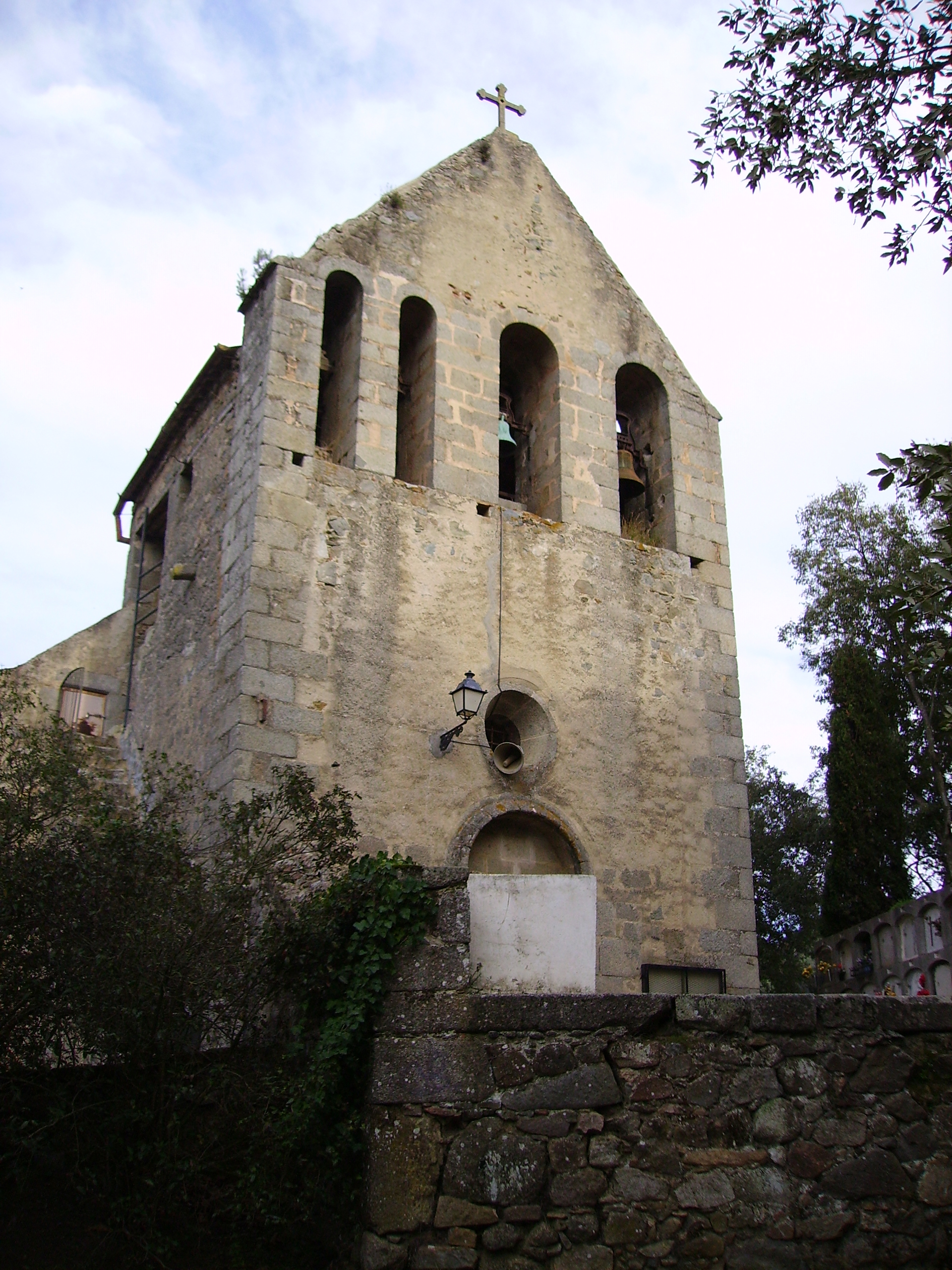 Església de Sant Esteve, Canyamars, El Maresme, Catalunya.